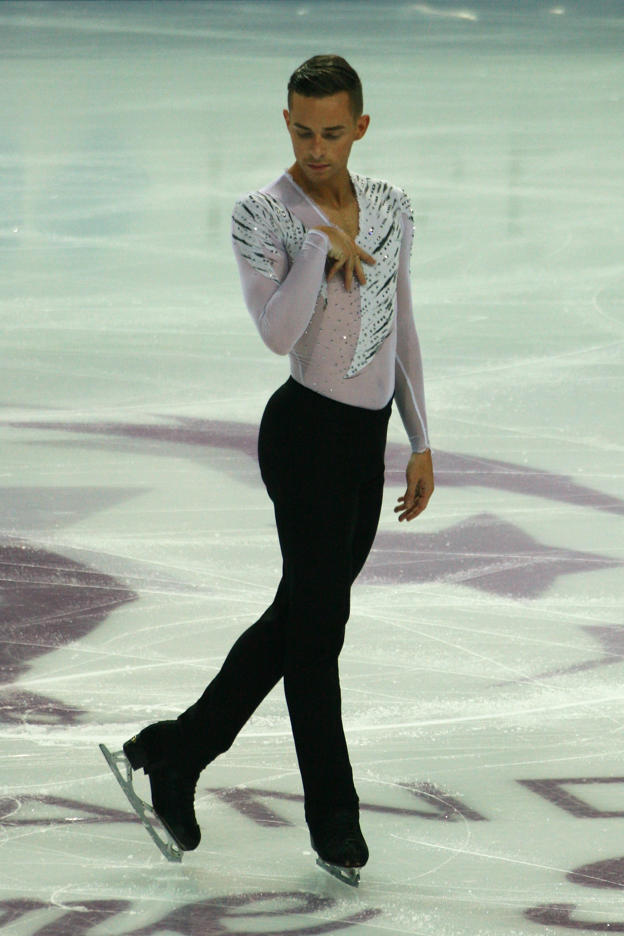 Адам Риппон (США) на финале Гран-при по фигурному катанию 2016-2017